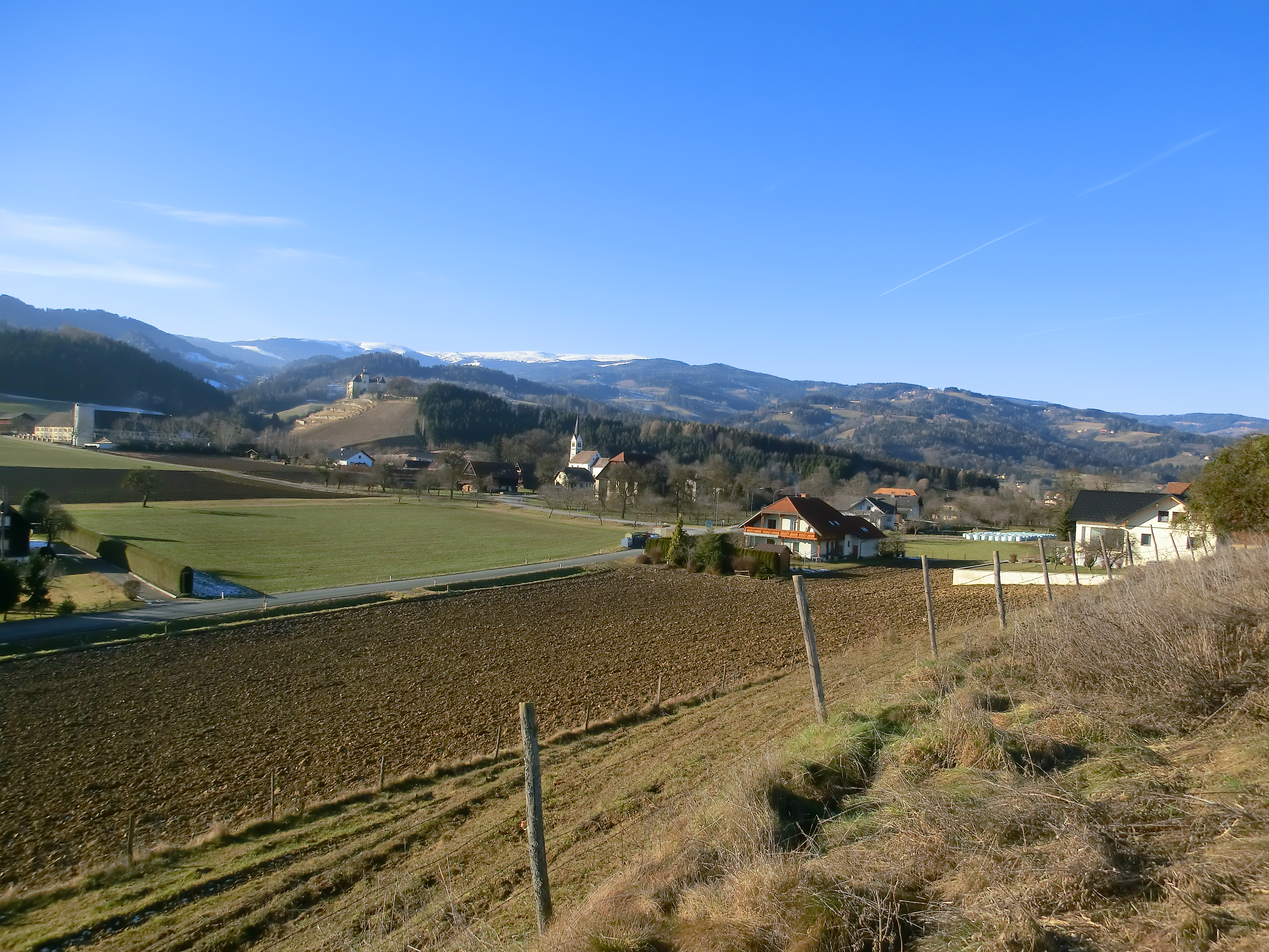 Siegelsdorf von einem Hügel von Osten gesehen